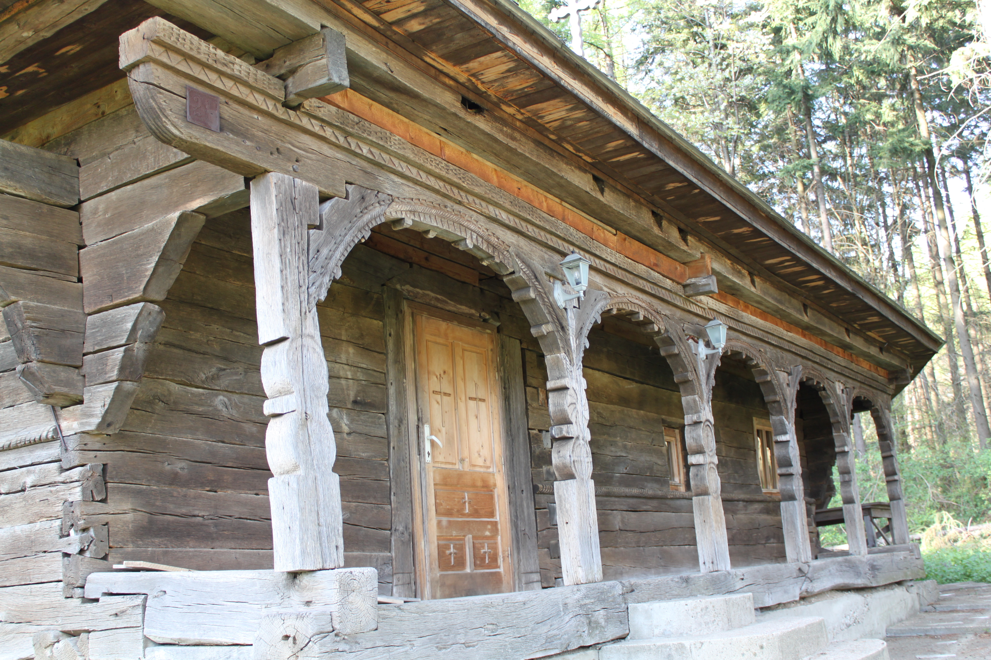 Biserica de lemn din Subpiatră, judeţul Bihor.